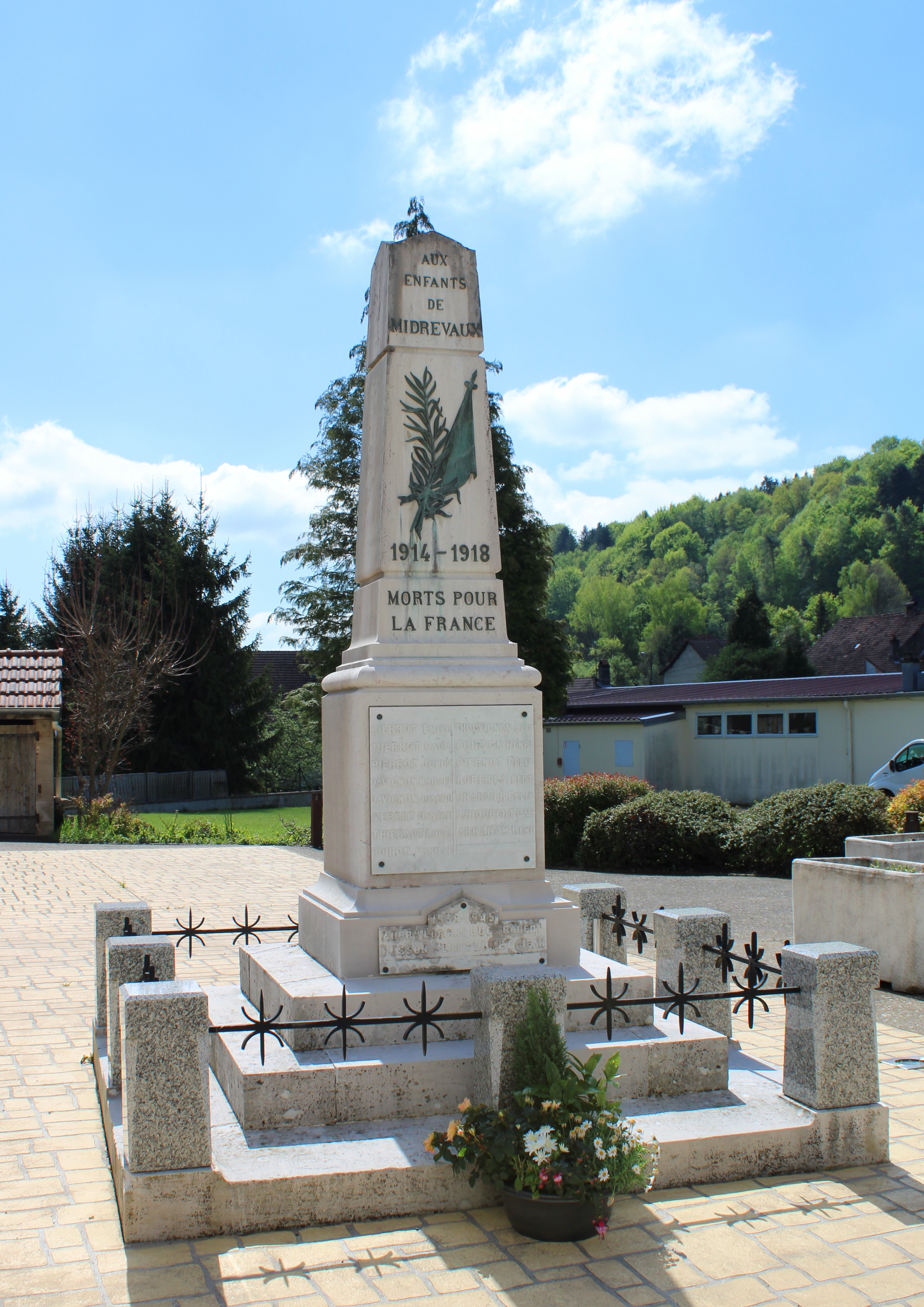 Le monument aux morts